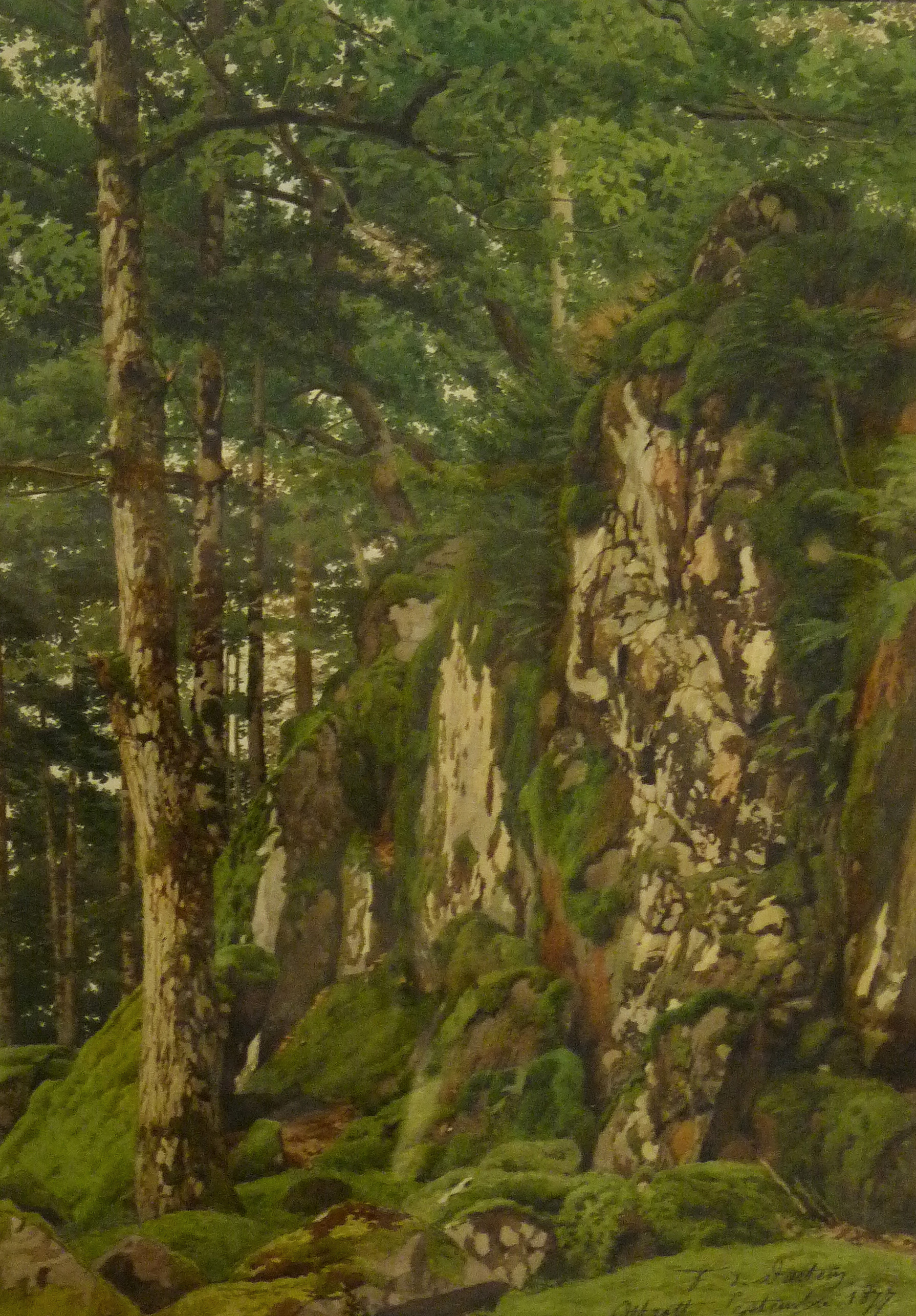 Rocher dans la forêt d'Ottrotttitle QS:P1476,fr:"Rocher dans la forêt d'Ottrott" label QS:Lfr,"Rocher dans la forêt d'Ottrott"